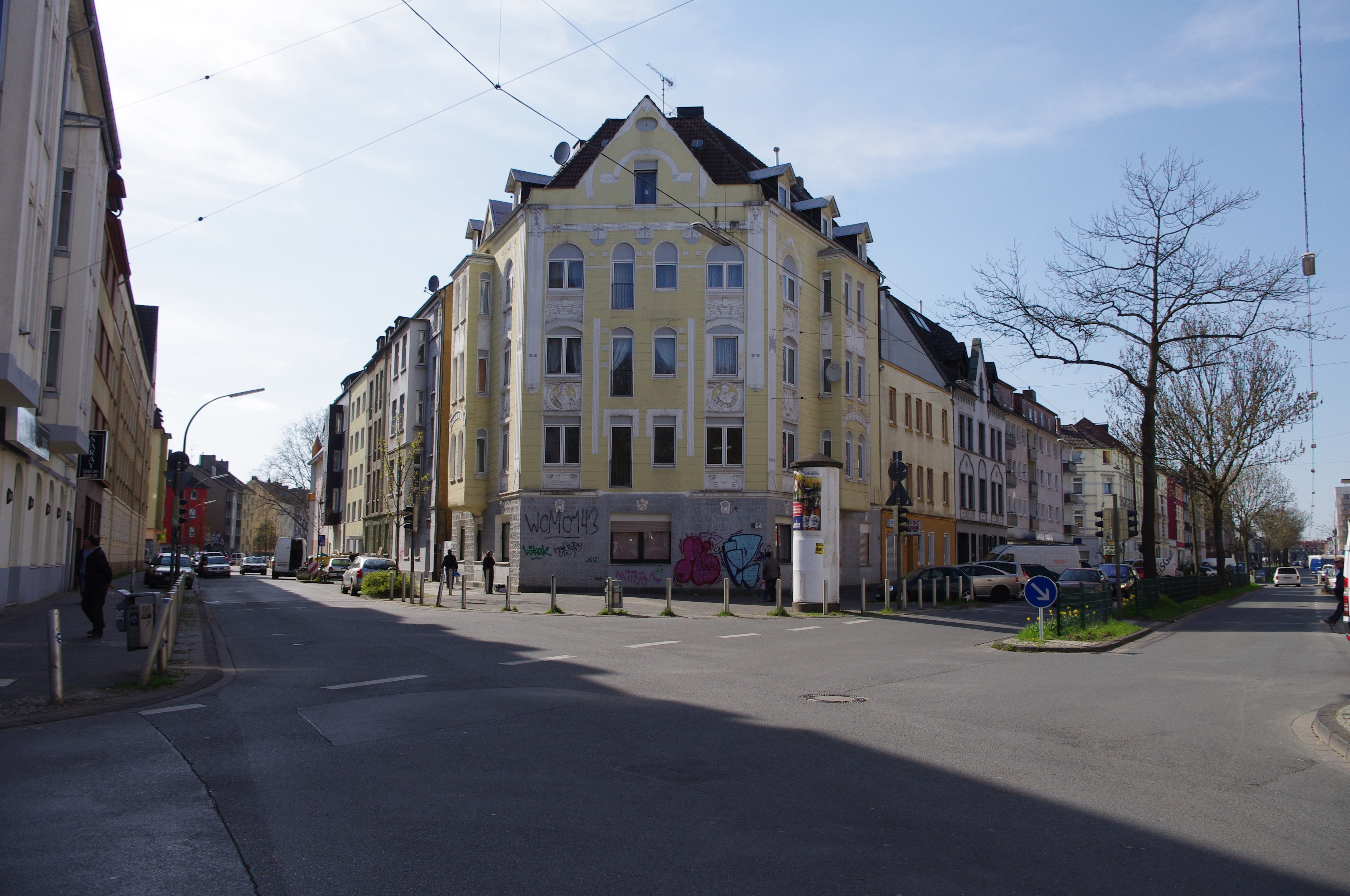 Wohn- und Geschäftshaus, Baudenkmal Nr. A 0153, Lortzingstr. 4, Dortmund This is a photograph of an architectural monument. 0153